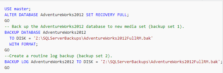 Монгол: Жишээ: Зураг-2